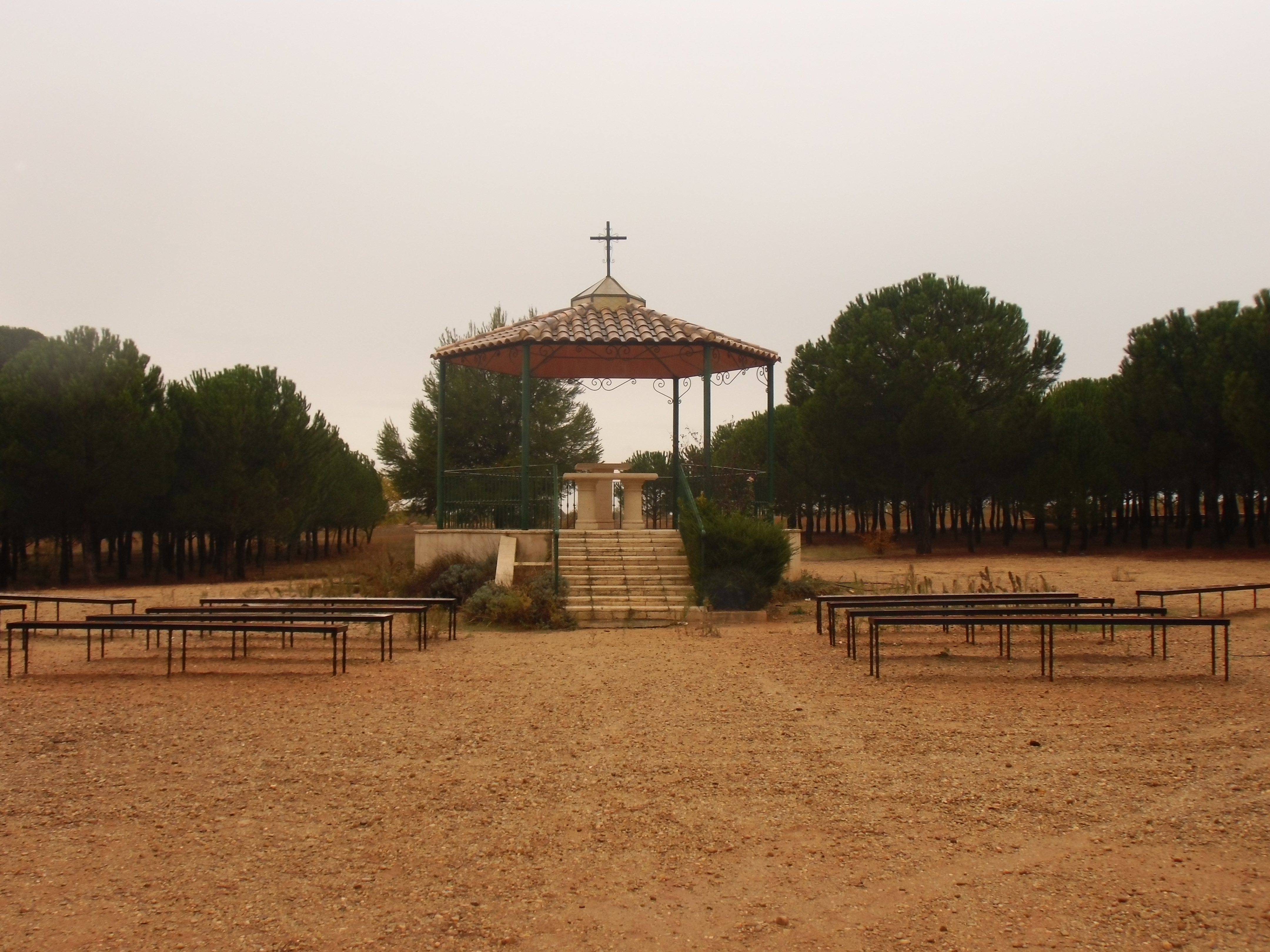 Este es el lugar donde se celebra San Isidro. (El tesorillo)